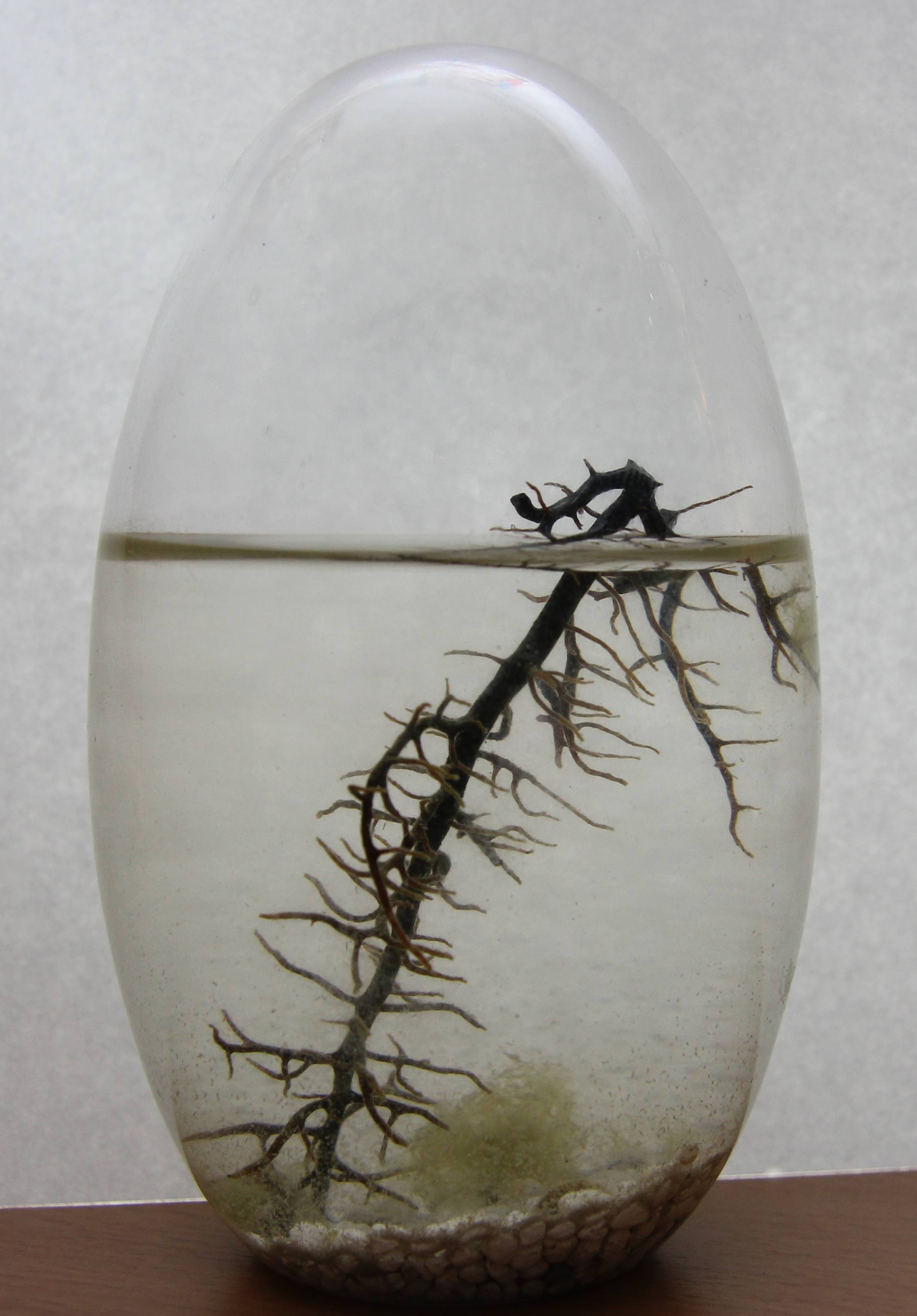 Kleinstaquarium Ecosphere